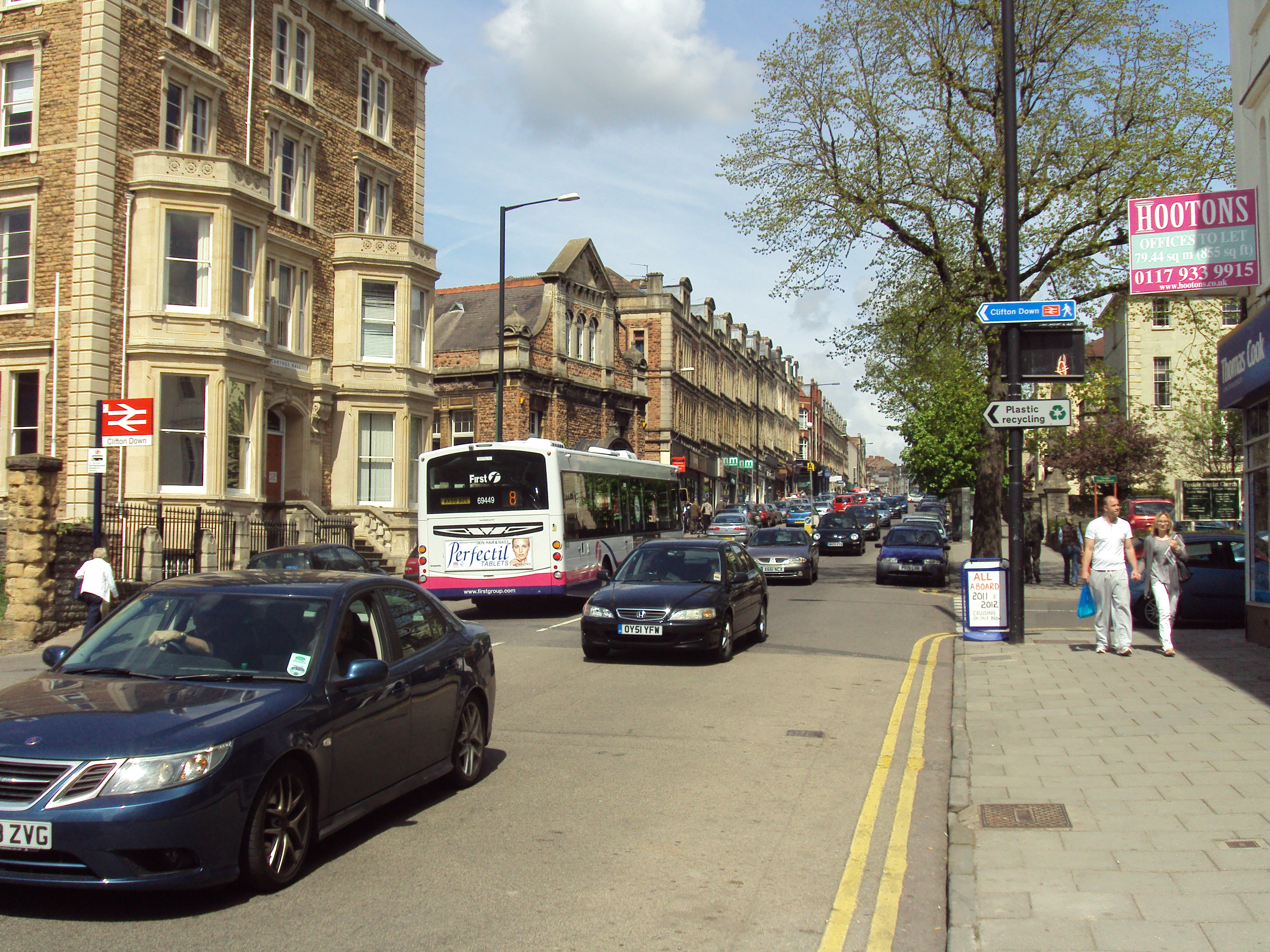 Looking up Whiteladies Road, Bristol.